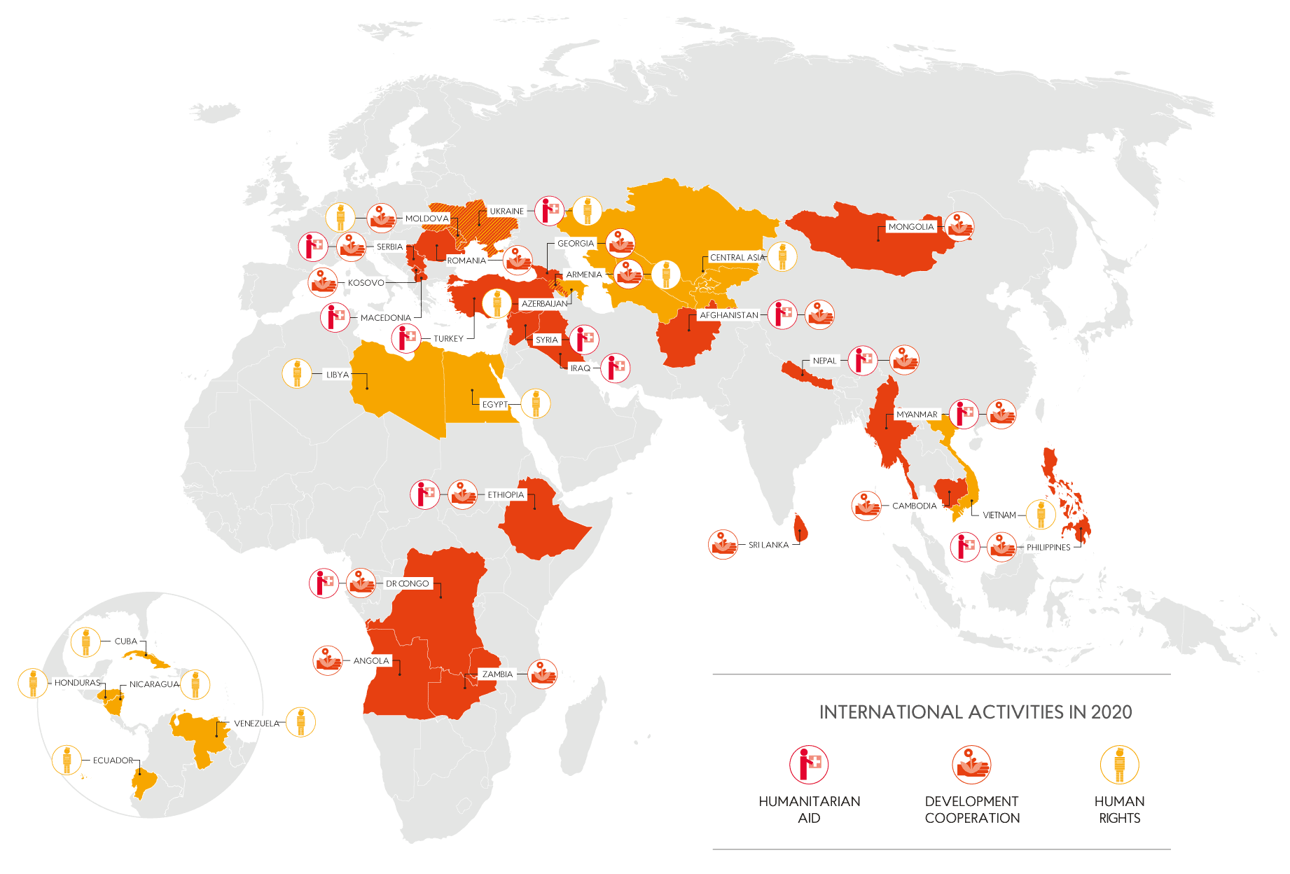 Mezinárodní působení neziskové organizace Člověk v tísni v roce 2020